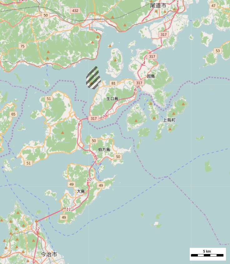 広島県尾道市の高根島を示したもの。 This map may be incomplete, and may contain errors. Don't rely solely on it for navigation.